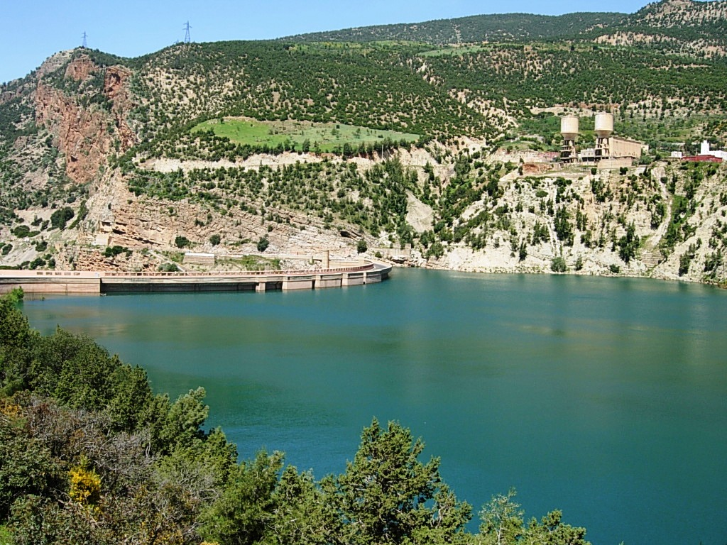 Barrage Bin el Ouidane